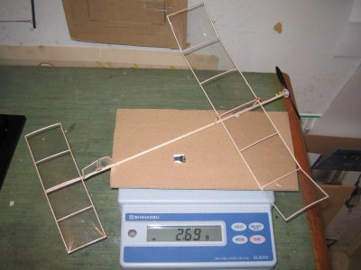 Ultra léger de 2,63g d'après un plan de Koichi TANAKA. Envergure : 30cm Masse : 2,69g, radio : Didel Iz2, émetteur : PiccoZ.